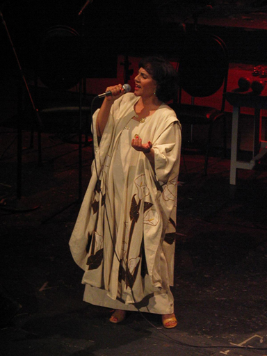 Elisa perez Meza, cantante de origen sinaloense